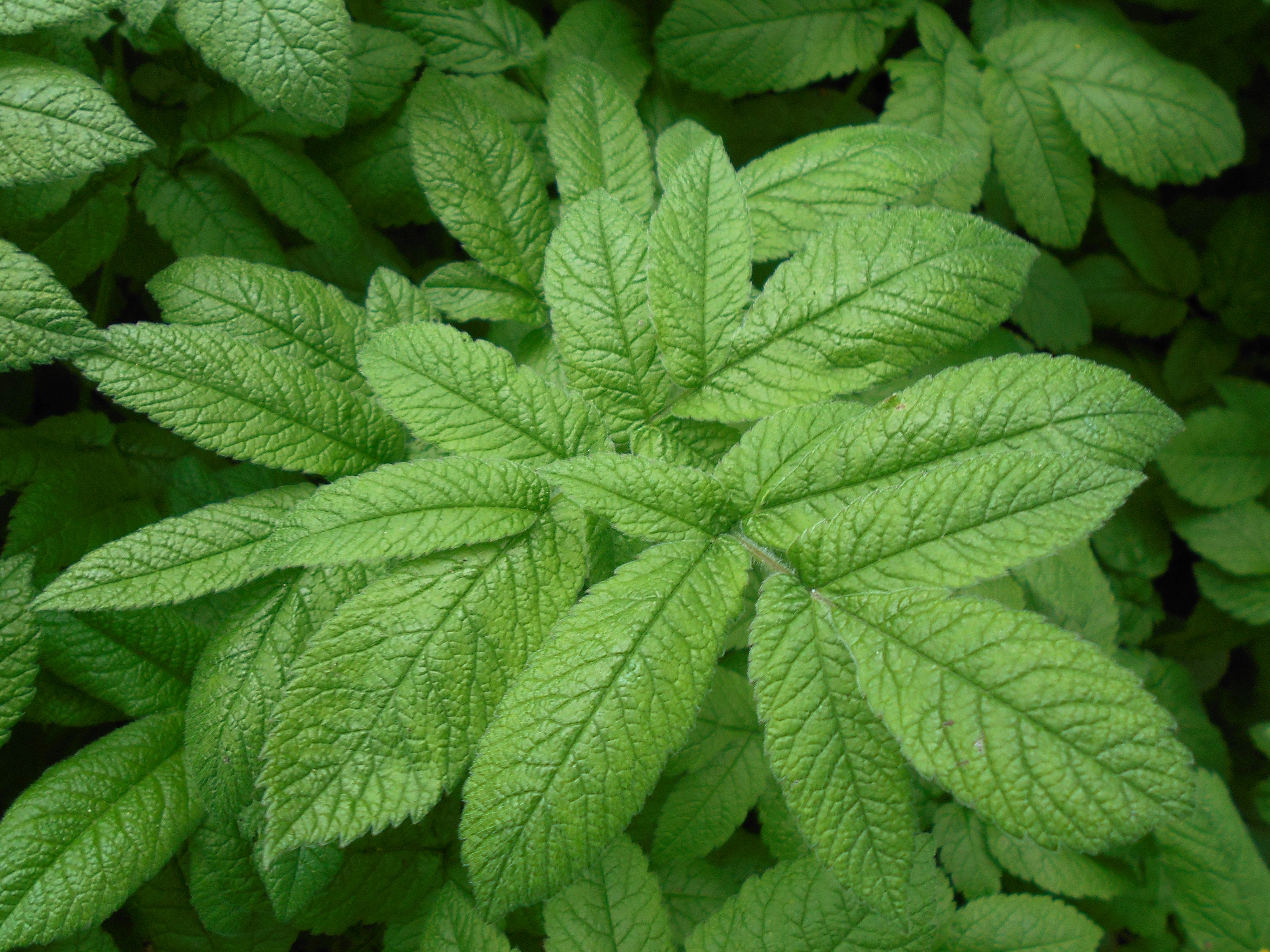 Świerząbek korzenny (Chaerophyllum aromaticum), Ogród Botaniczny Uniwersytetu Warszawskiego.